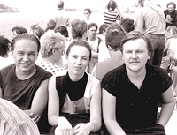 Фотография была сделана на пароме. Хельсинки. Август 1988 год. Яри Кокко, Светлана Родина, Валерий Родин